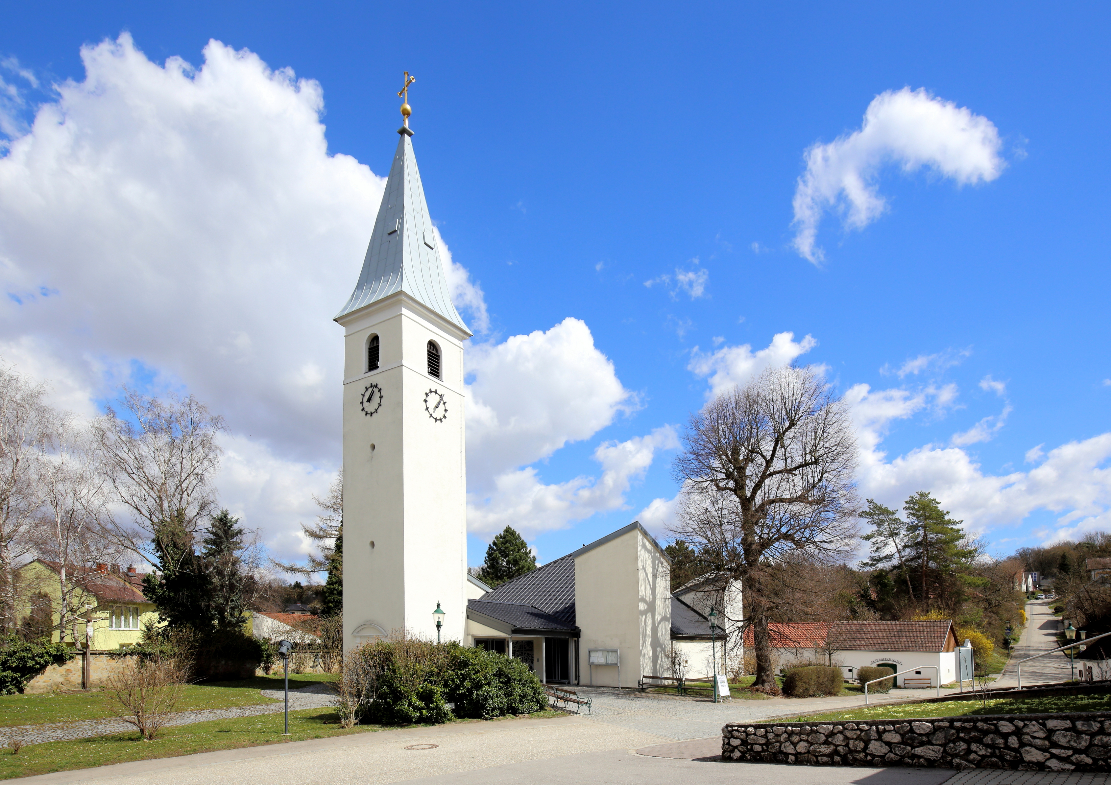 Südwestansicht der katholischen Pfarrkirche hl. Vitus in Würnitz, ein Ortsteil der niederösterreichischen Marktgemeinde Harmannsdorf. Die Kirche wurde 1971 nach Plänen des Architekten Erwin Plevan unter Einbezug des Kirchturmes vom Vorgängerbau errichtet.